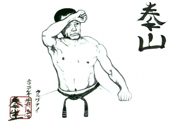 Kenzan: "Puño montaña" A Shoshin Nagamine O'Sensei J. E. Kensei Castro - Uruguay, 5 de abril de 2011